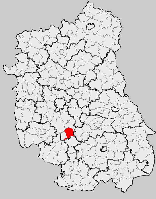 Map of gmina Wysokie, Lublin county, Lublin voivodship Mapa gminy Wysokie, powiat lubelski, województwo lubelskie